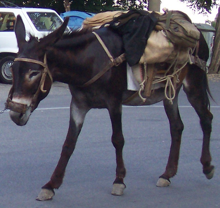 Asino a Pazzano